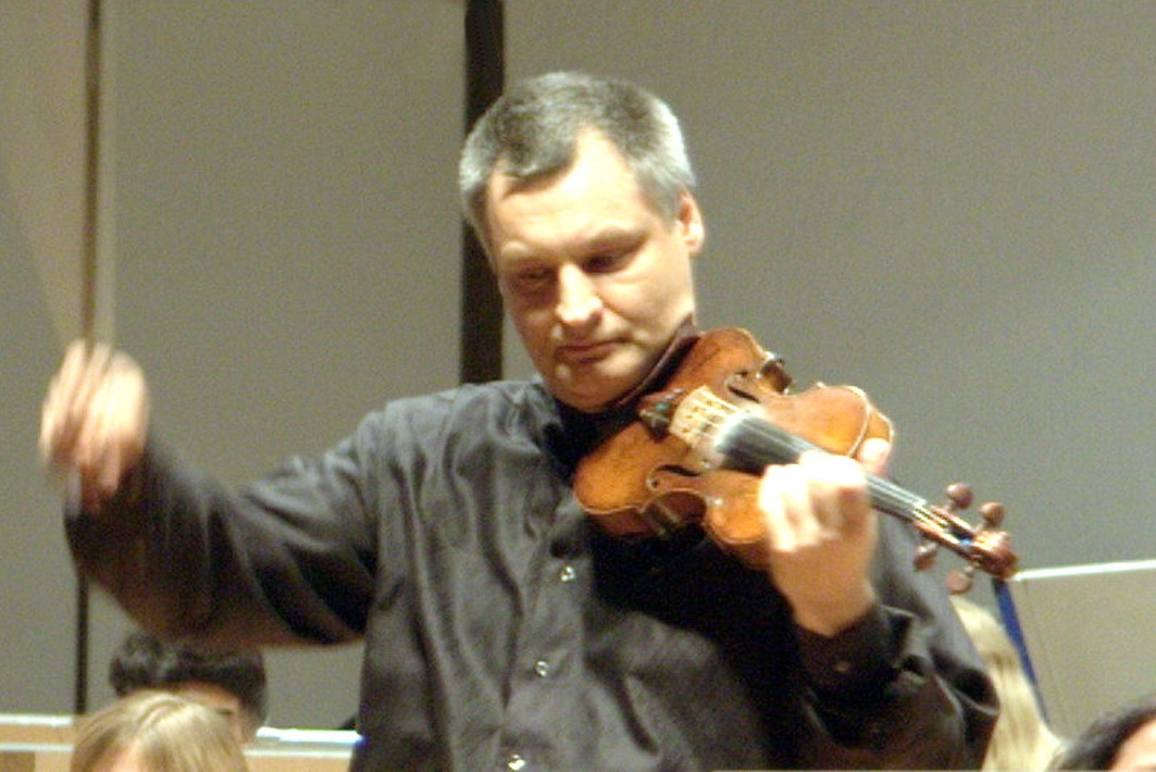 Астраханцев, Владимир Васильевич